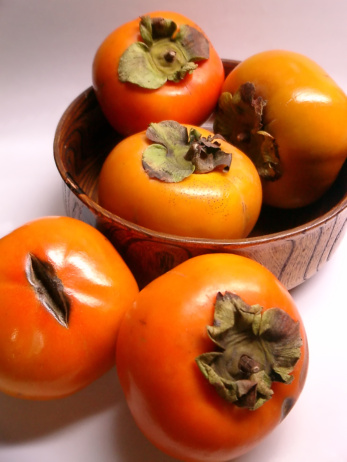 kaki,persimmon